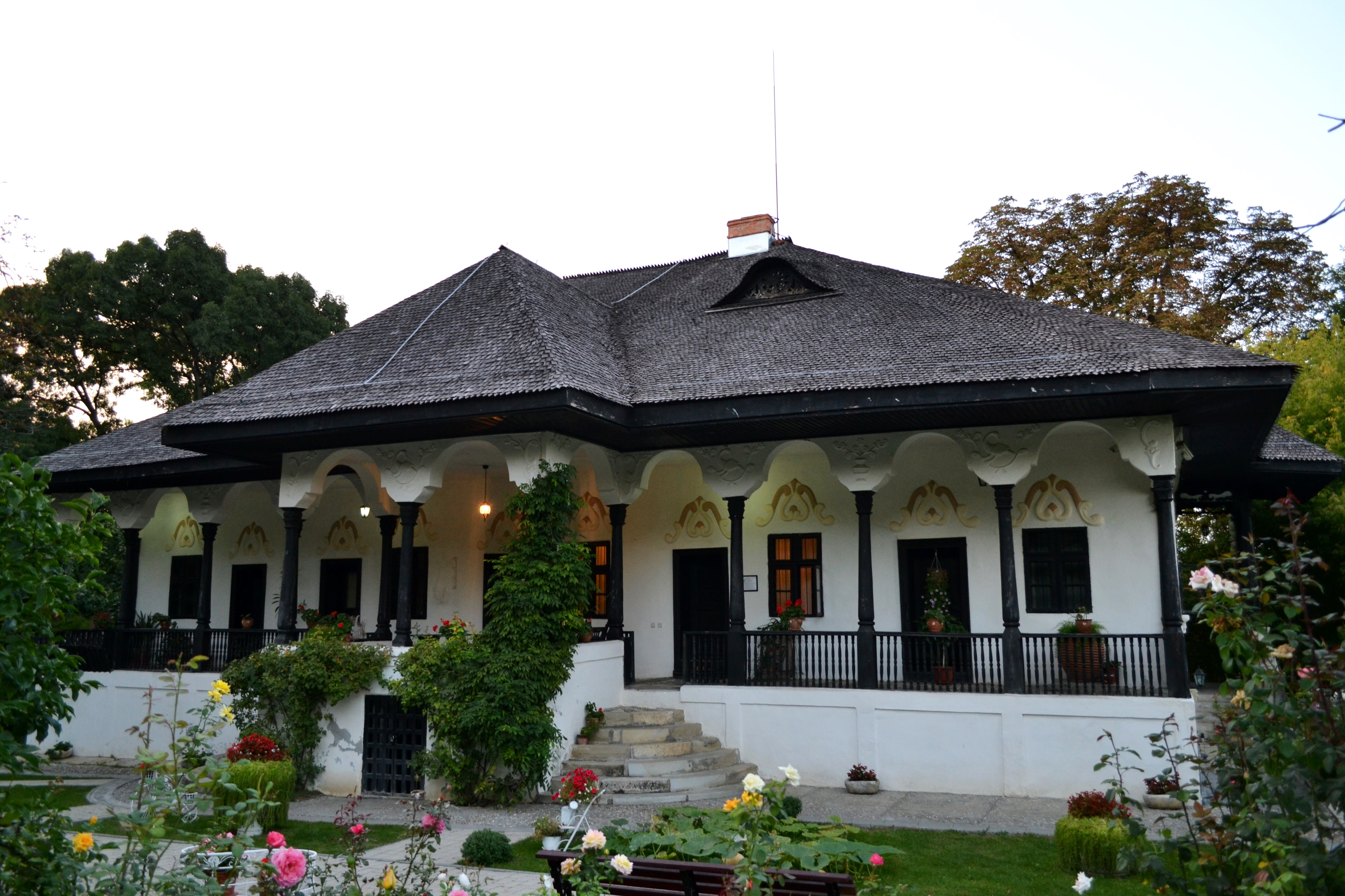 Conacul Bellu, azi Muzeul de Etnografie 01